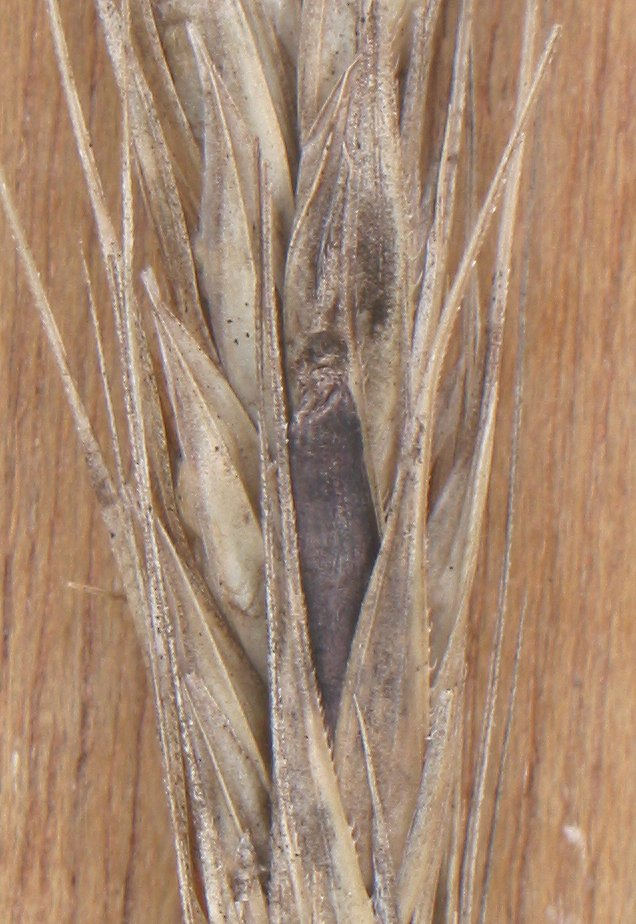 (nl: moederkoren op rogge) Claviceps purpurea on Secale cereale